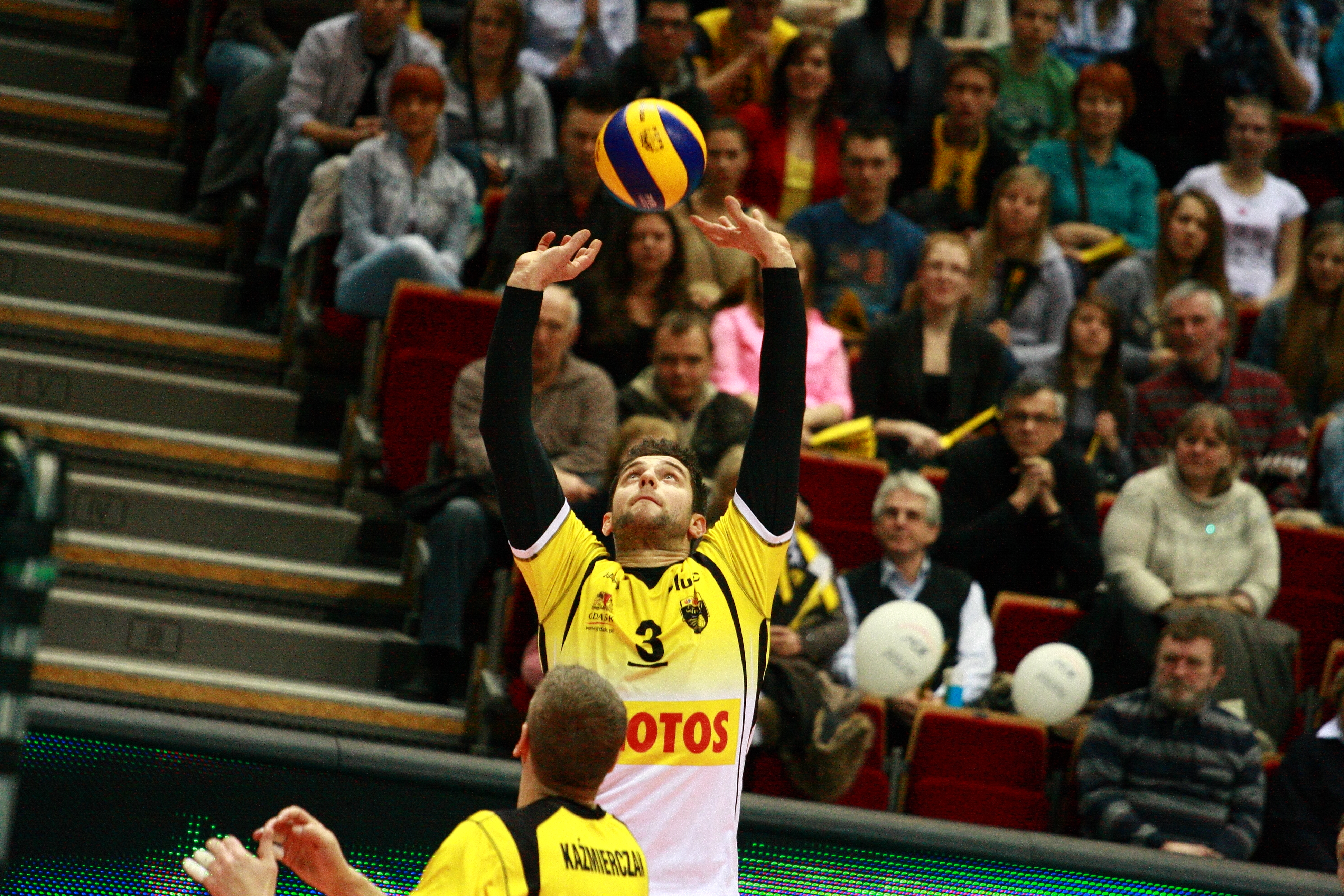 Lotos Trefl Gdańsk vs Skra Bełchatów